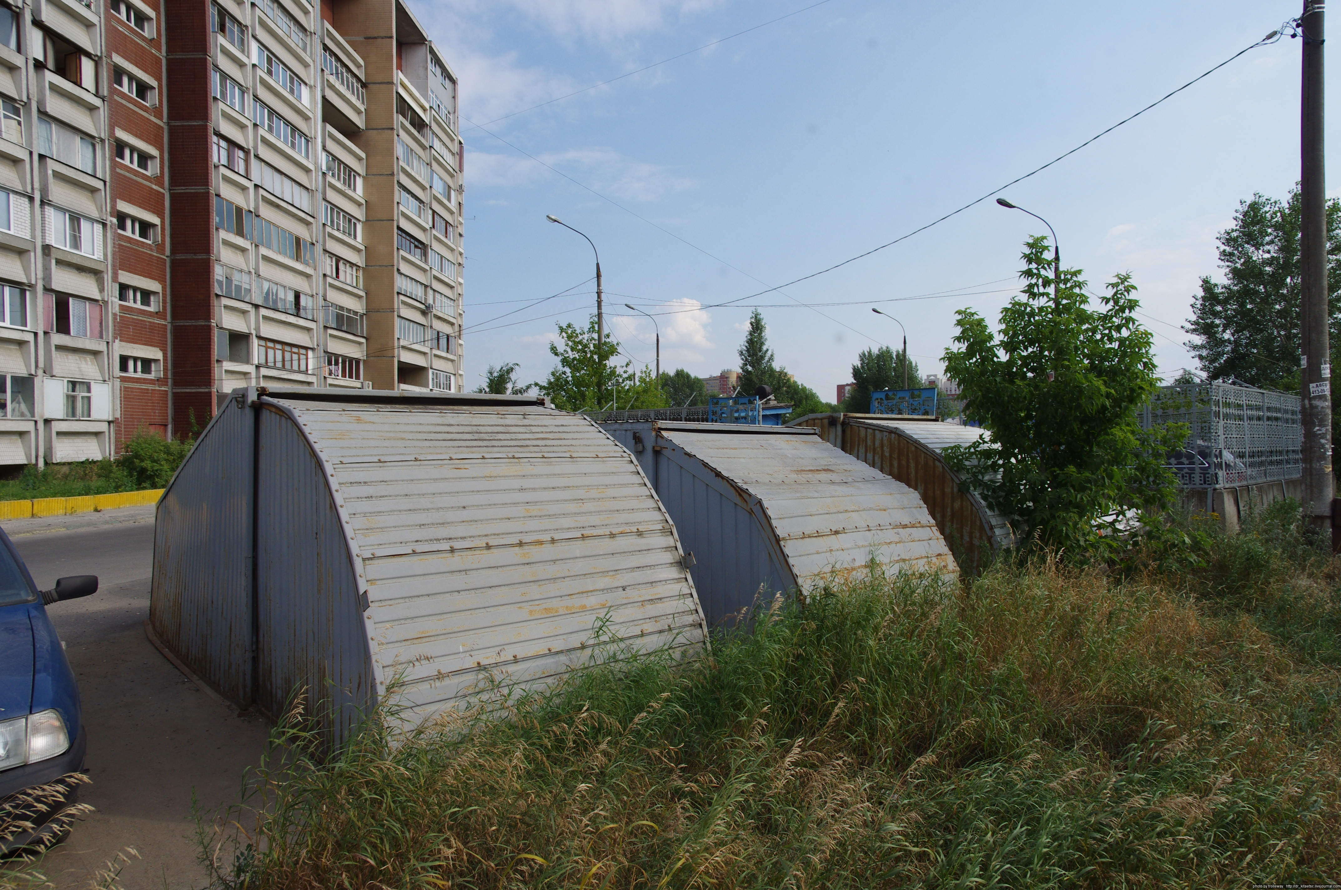 Late USSR luxury architecture. Нижний Новгород, 6-й микрорайон Мещёрского озера. Экспериментальный жилой район постройки конца 1980-х